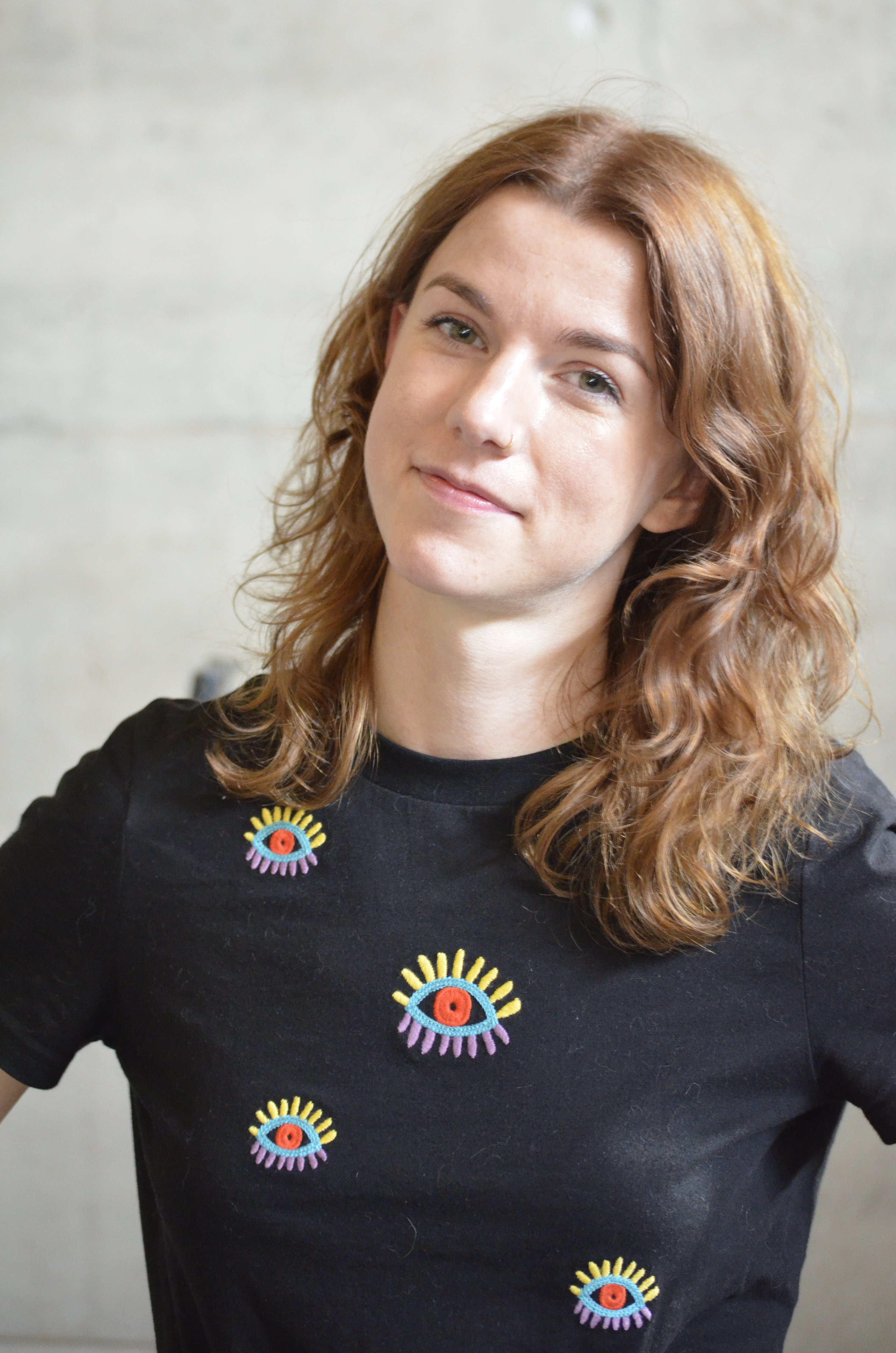 Ellen Ekman Världskulturmuseet Göteborg 2017